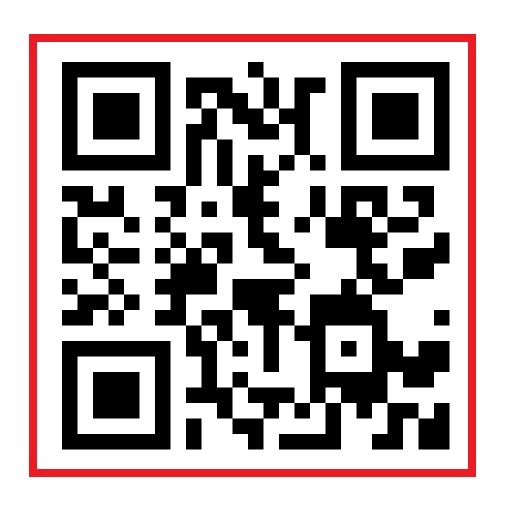 Terompah